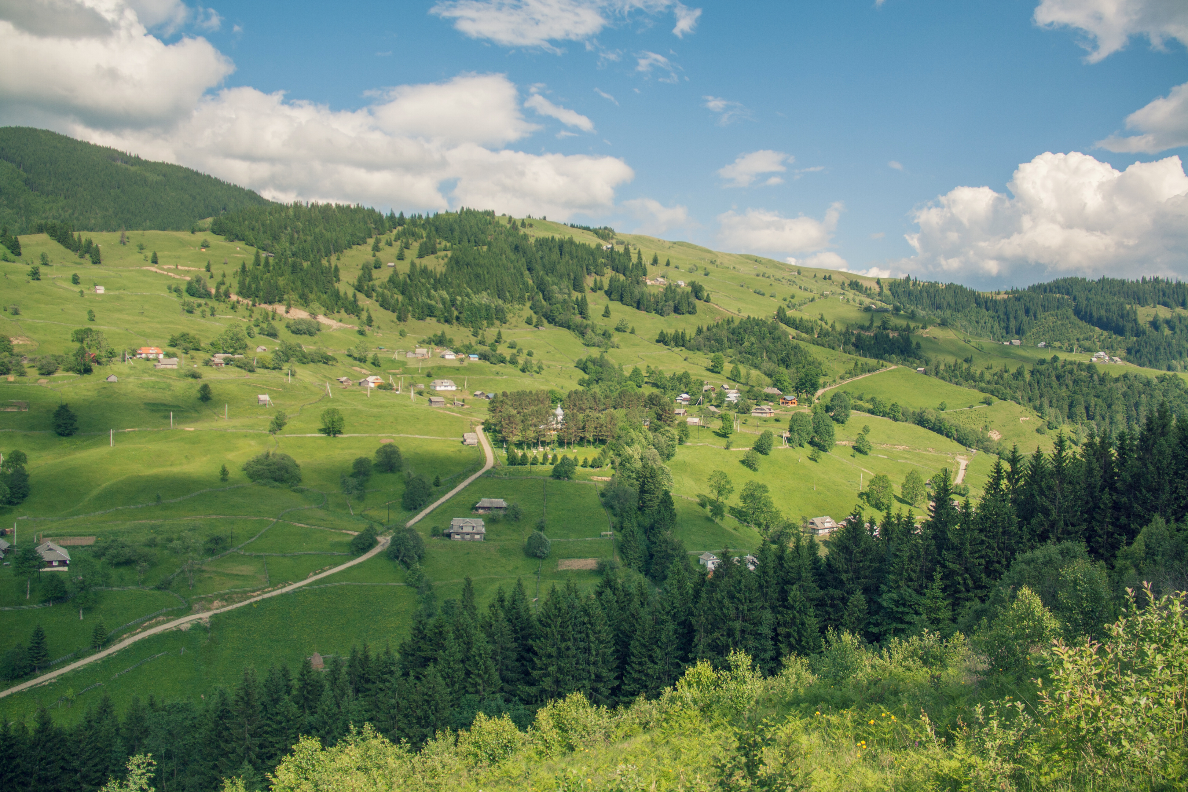 Berezhnytsya, Ucrania